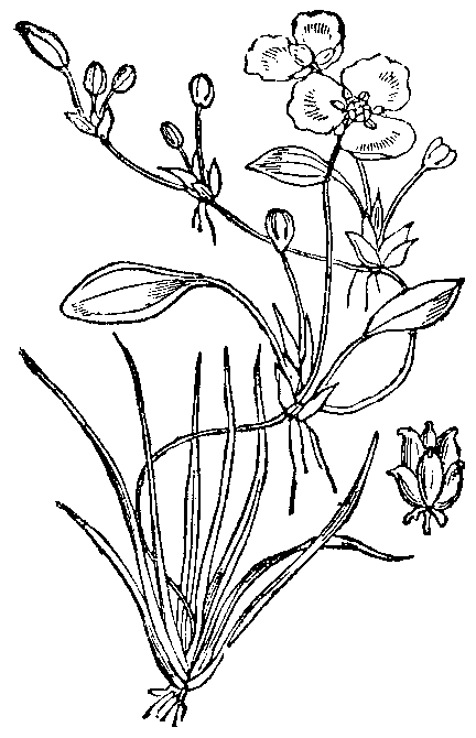 Slika 146. Plavajoči poréčnik. (Alísma nátans.)